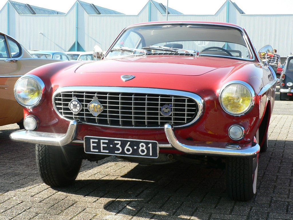 EE-36-81 Volvo Klassieker Beurs 2008